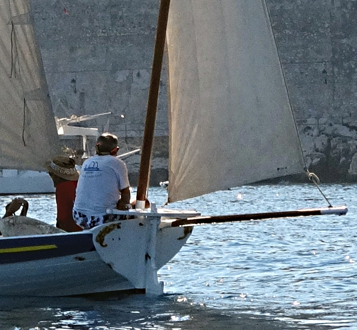 Queue de malet à l'arrière de la yole de Bantry "Laïssa Ana" de Villefranche-sur-Mer